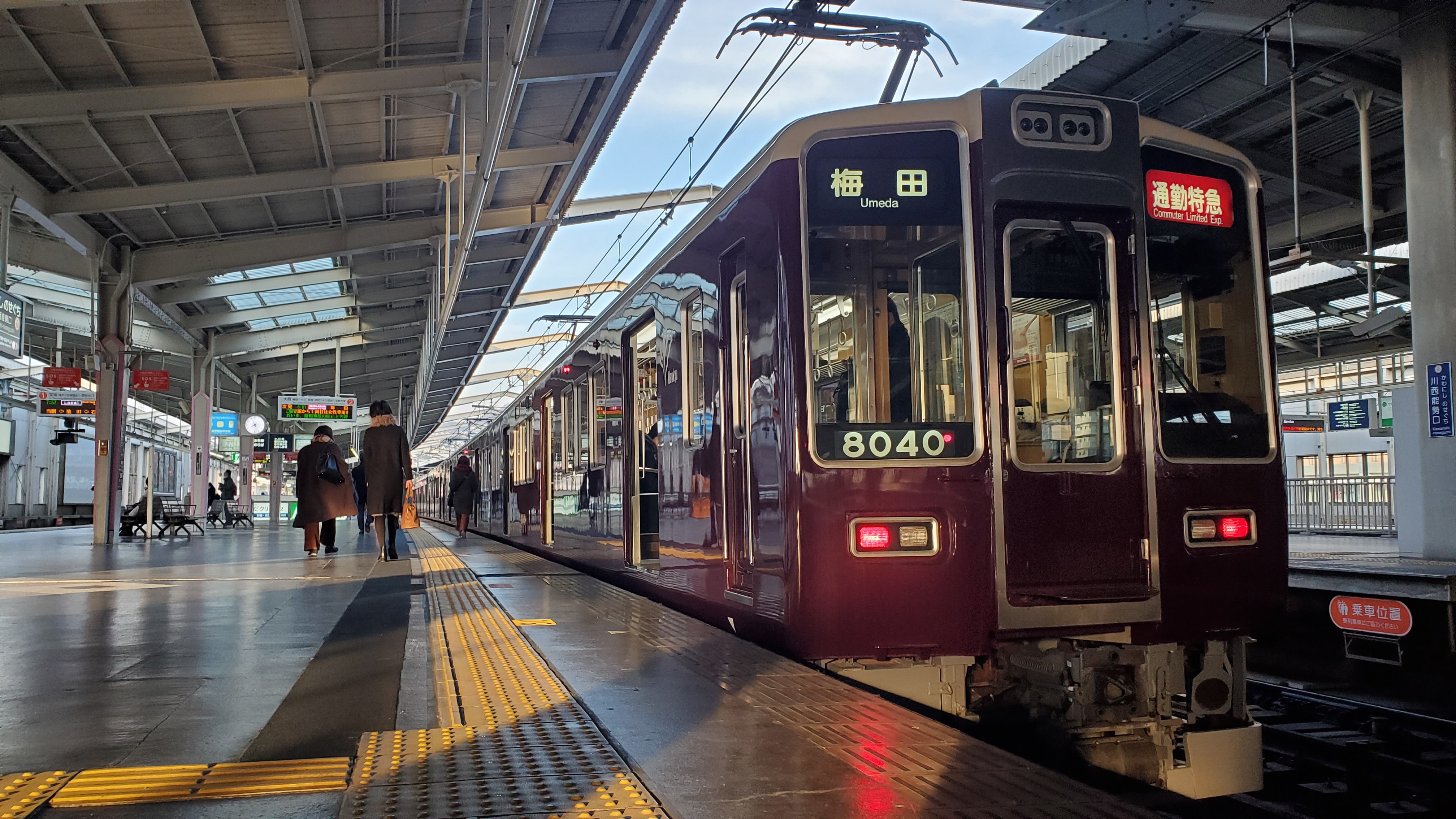 Commuter Limited Express 8040F